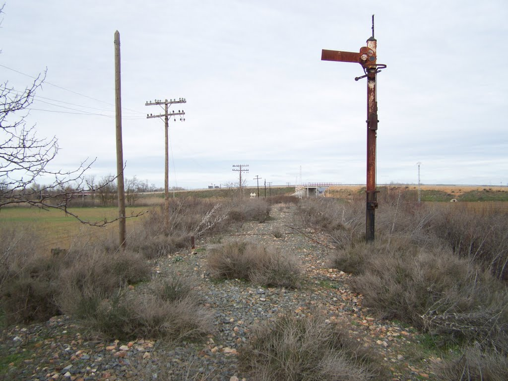 el tramo se queda desmantelada desde 1988 en zona de Ciudad Real